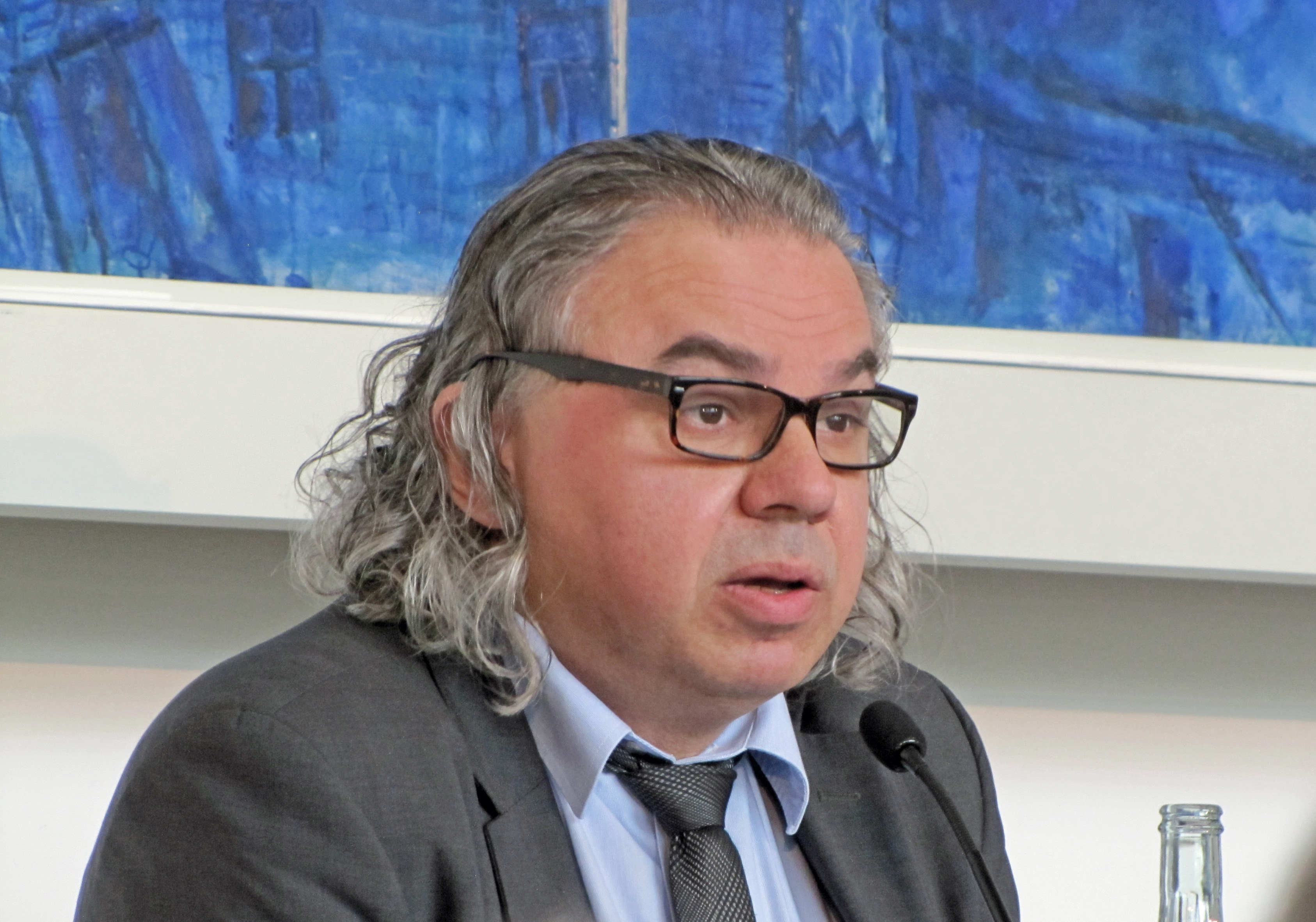 Artur Becker, bei den 45. Römerberggesprächen, Thema:Die Ohnmacht der Aufklärung und der Erfolg des Autoritären, im April 2017 im Chagall-Saal der Städtischen Bühnen in Frankfurt am Main.